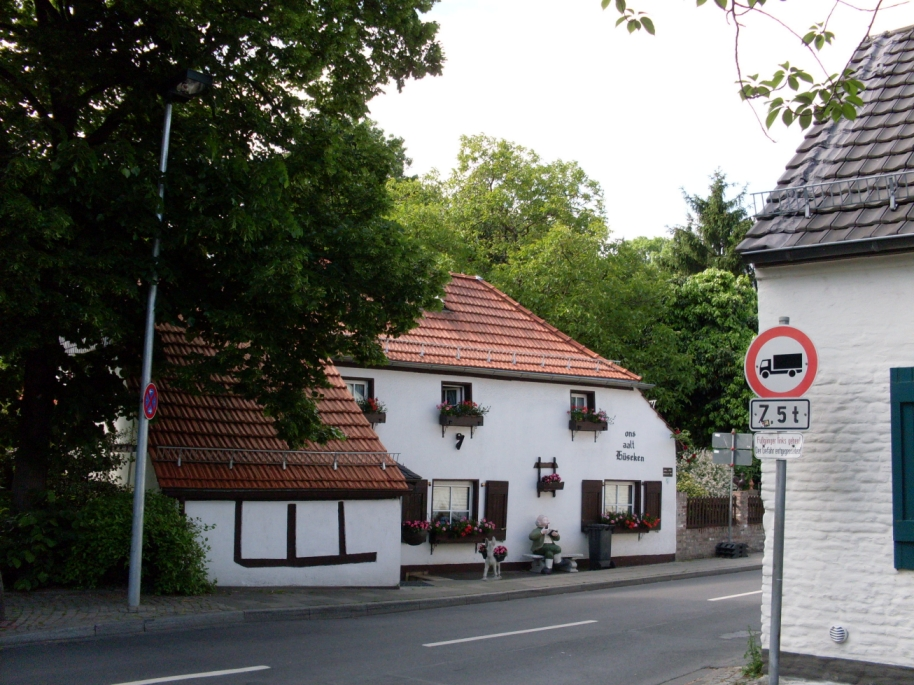 Düsseldorf-Lohausen Fachwerkhaus von 1795 im alten Ortskern